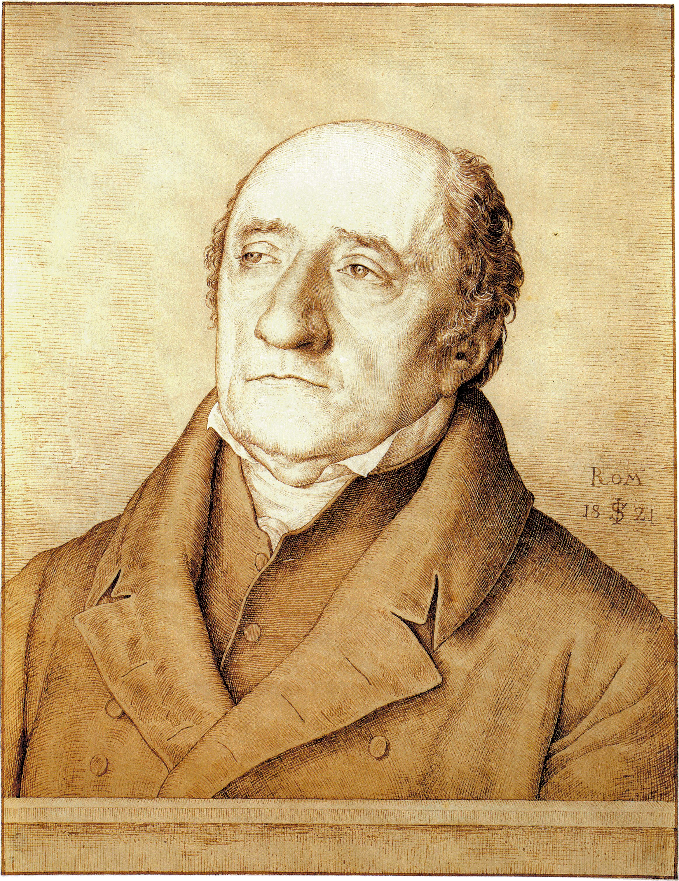 Bildnis des Reichsfreiherrn Karl vom und zum Stein, 1821